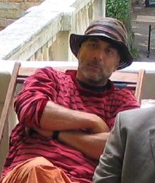 Ron Arad - Venice Biennale 2004